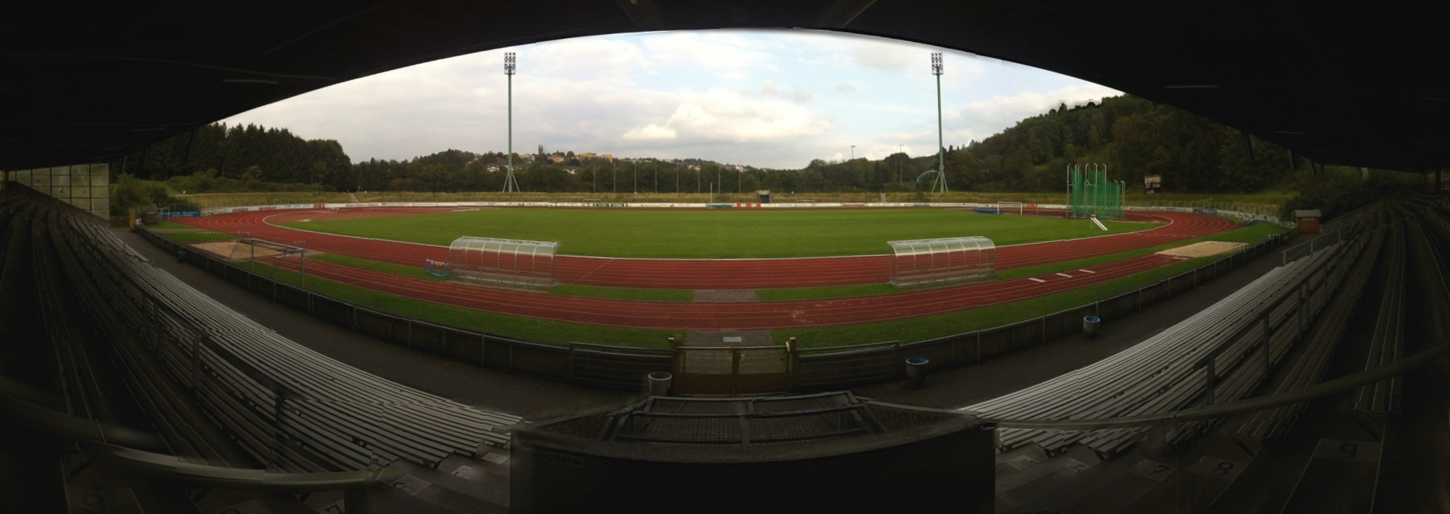 Panoramaansicht des Nattenbergstadions in Lüdenscheid (Naturrasen)